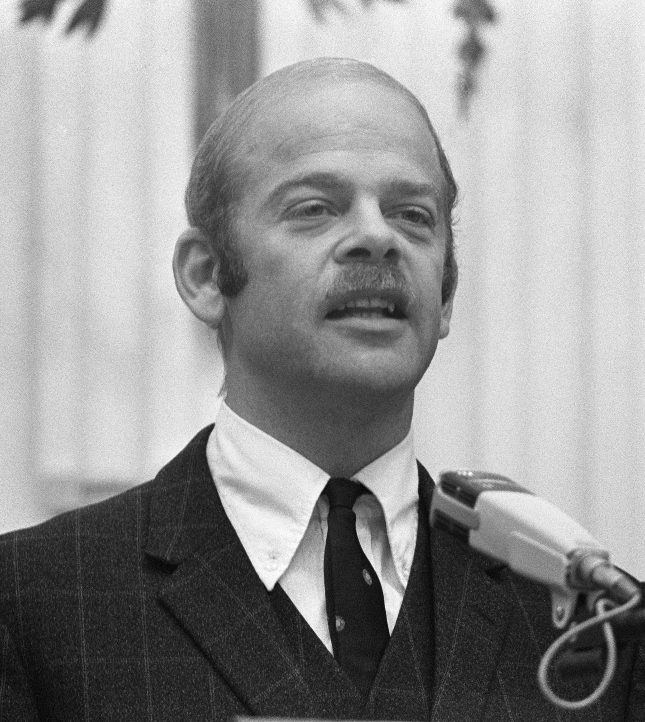 Algemene beschouwingen Tweede Kamer ; Bas de Gaay Fortman (PPR), kop